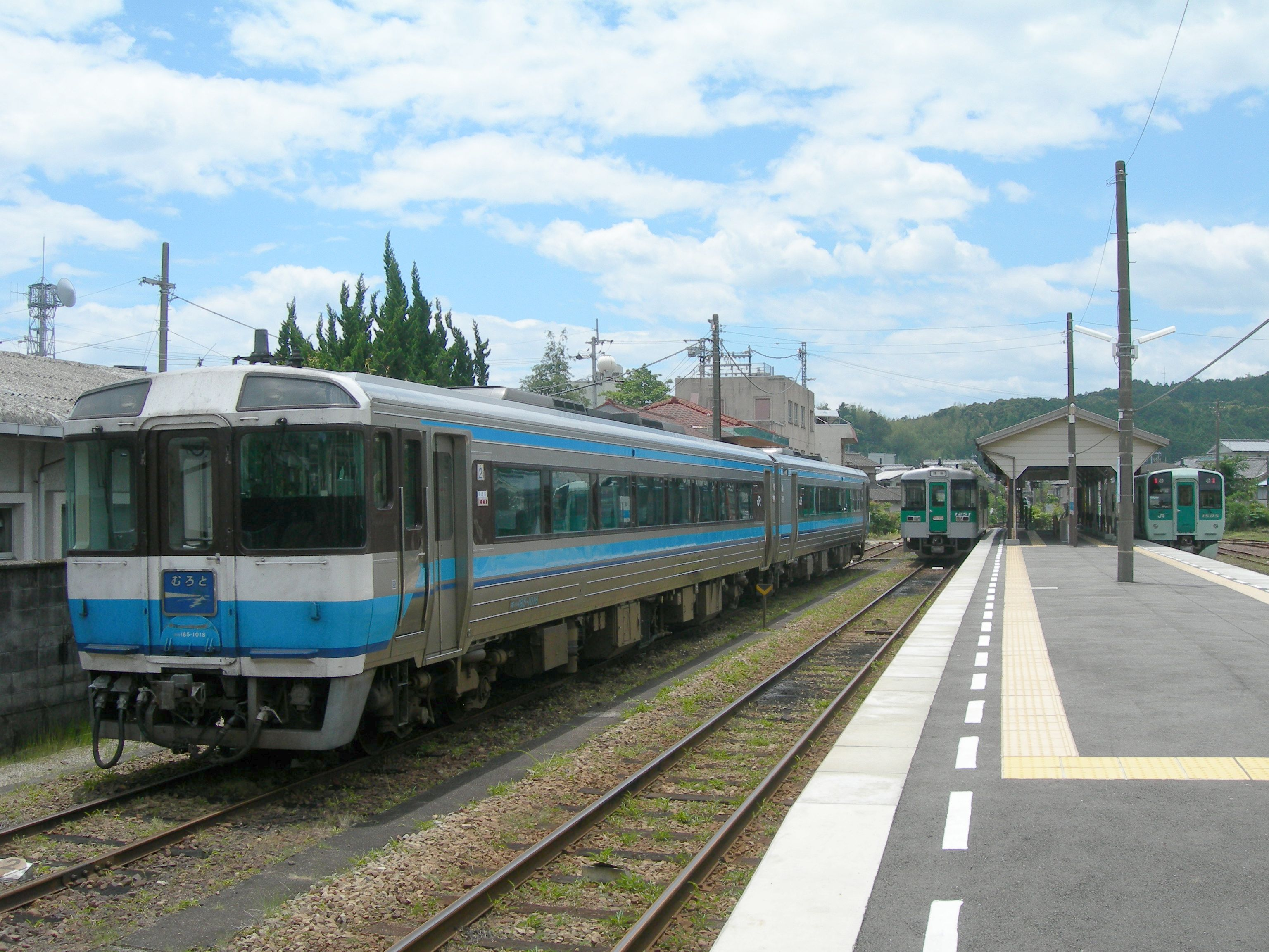 牟岐駅ホーム